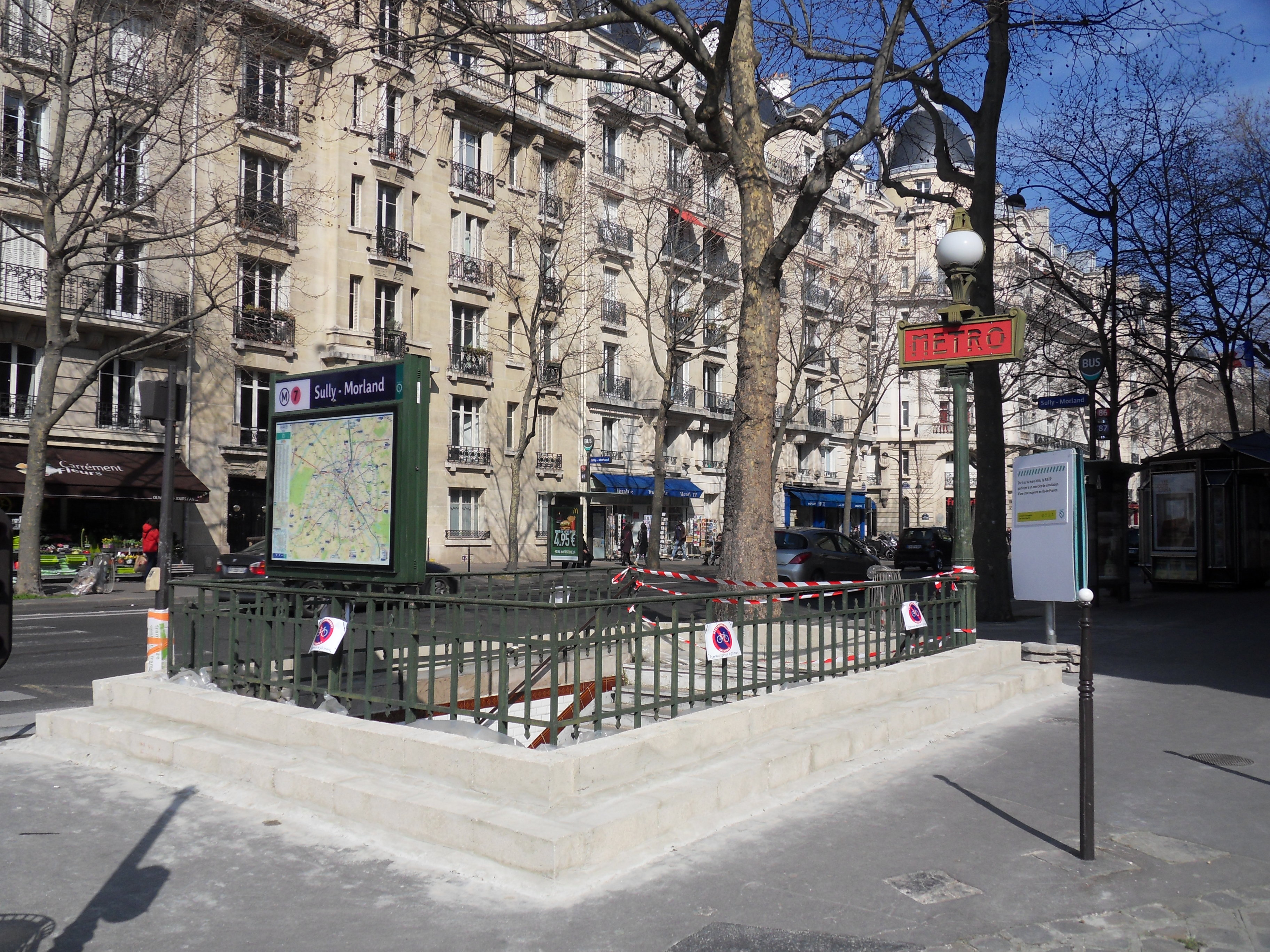 Préfiguration des procédures anti-crue de la RATP à la Station Sully-Morland du métro de Paris, 12 mars 2016.